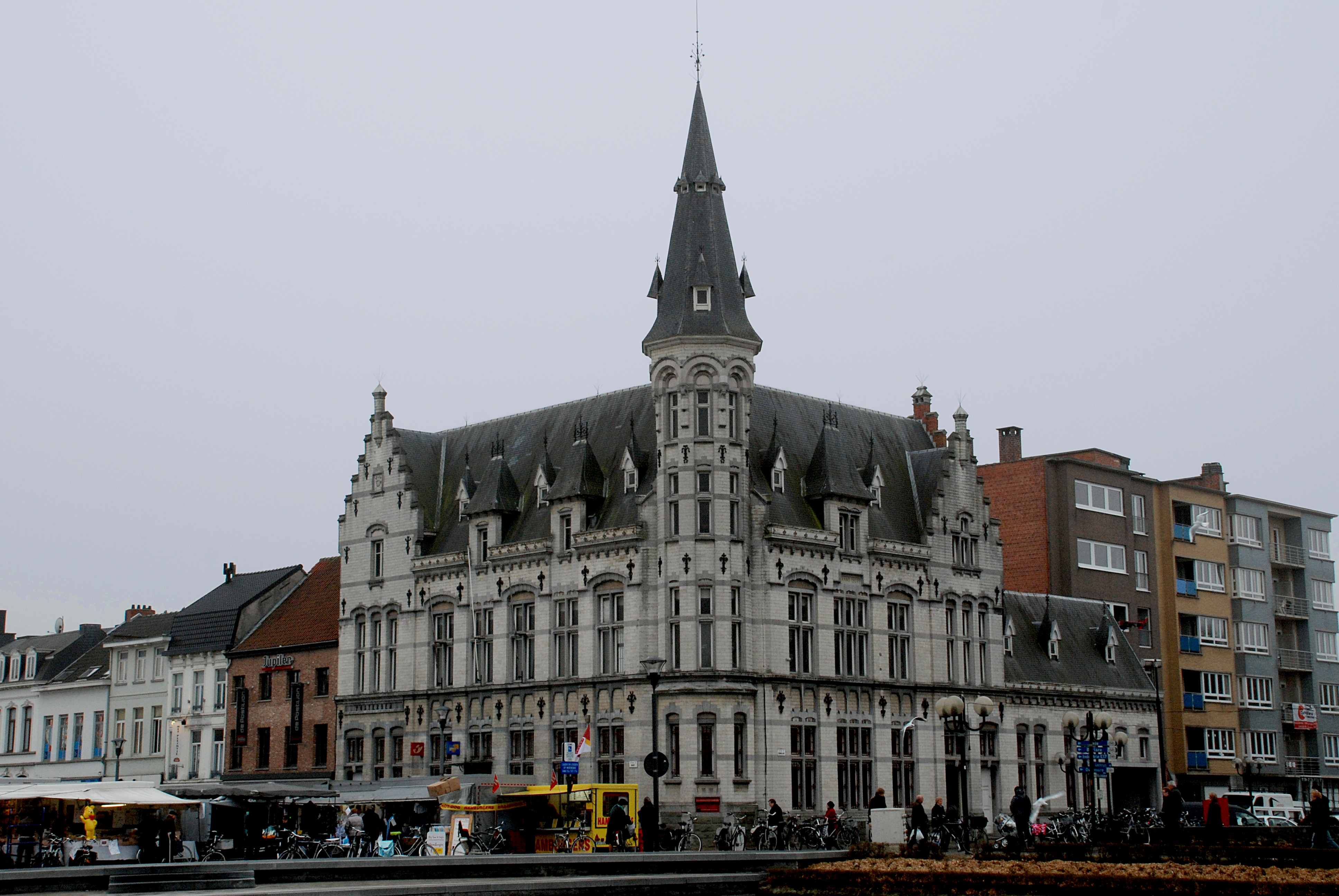 Lokeren onroerend erfgoed ID 17920